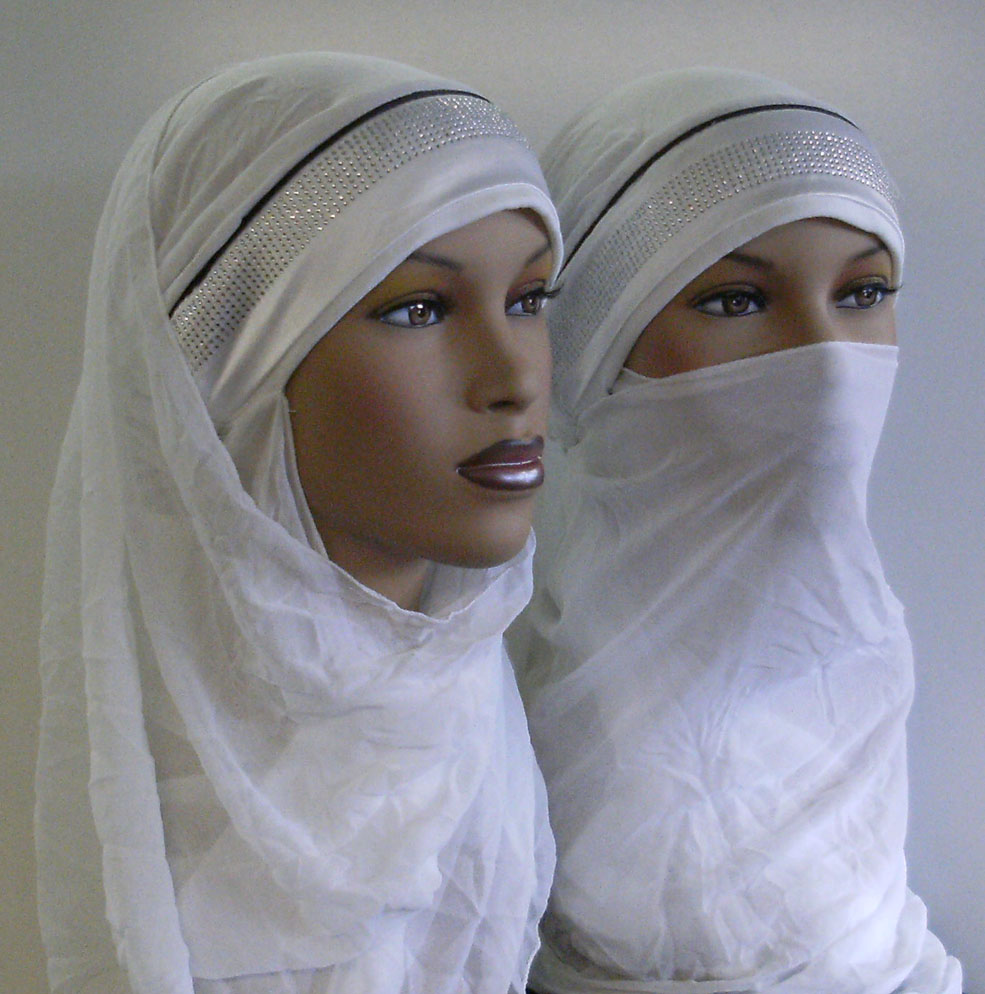 vestiti modesti per i musulmani e i non-musulmani